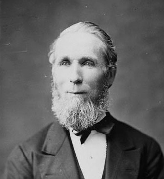 Alexander Mackenzie, premier ministre du Canada